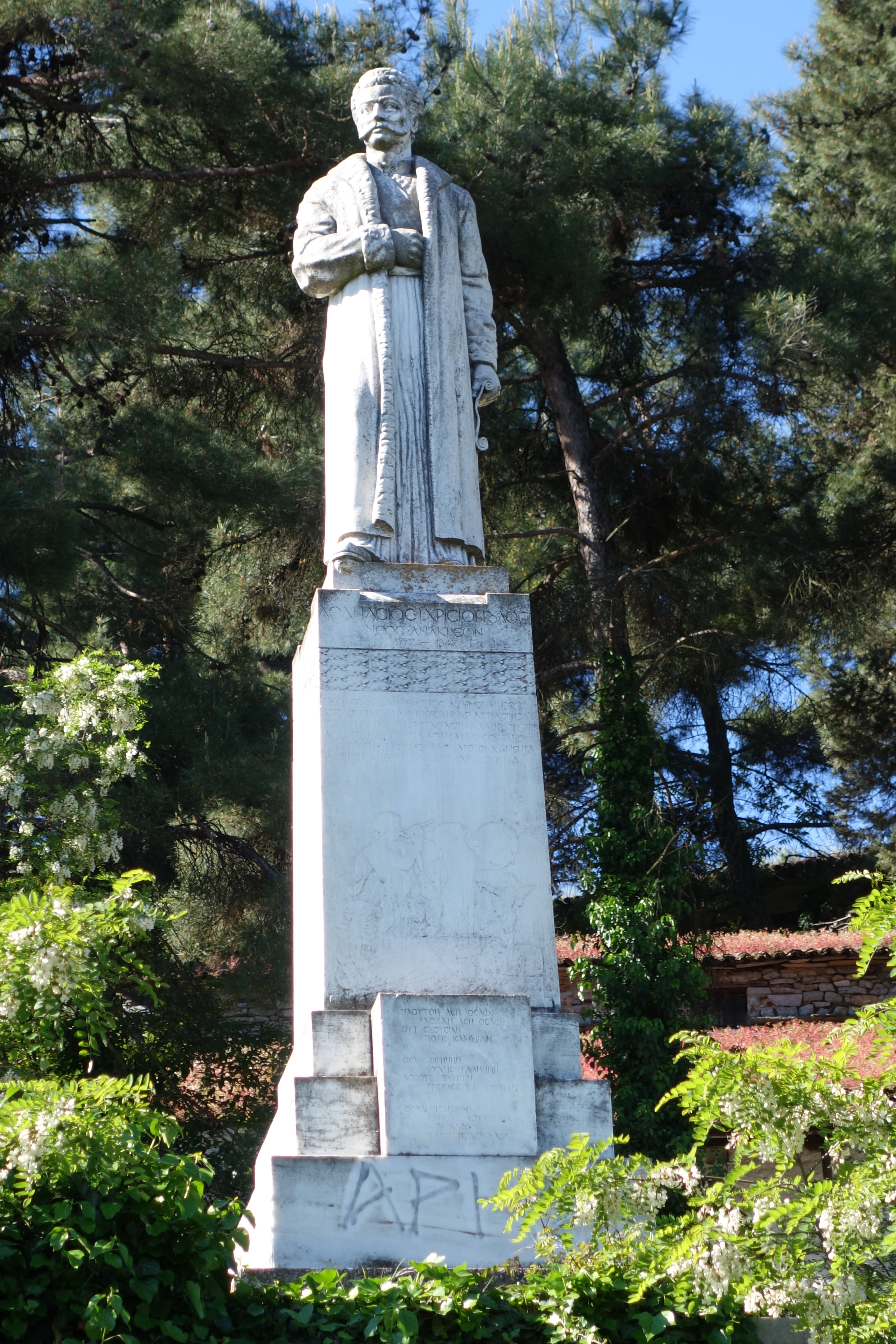 Kastoria, Griechenland. Kostur-Athanasios-Hristopoulos-Denkmal (1772–1847, Dichter).